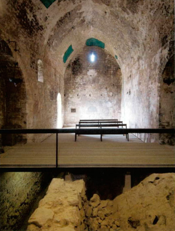 Detalle del subsuelo de la iglesia, donde aparecen los restos correspondientes al antiguo castillo de Madrona